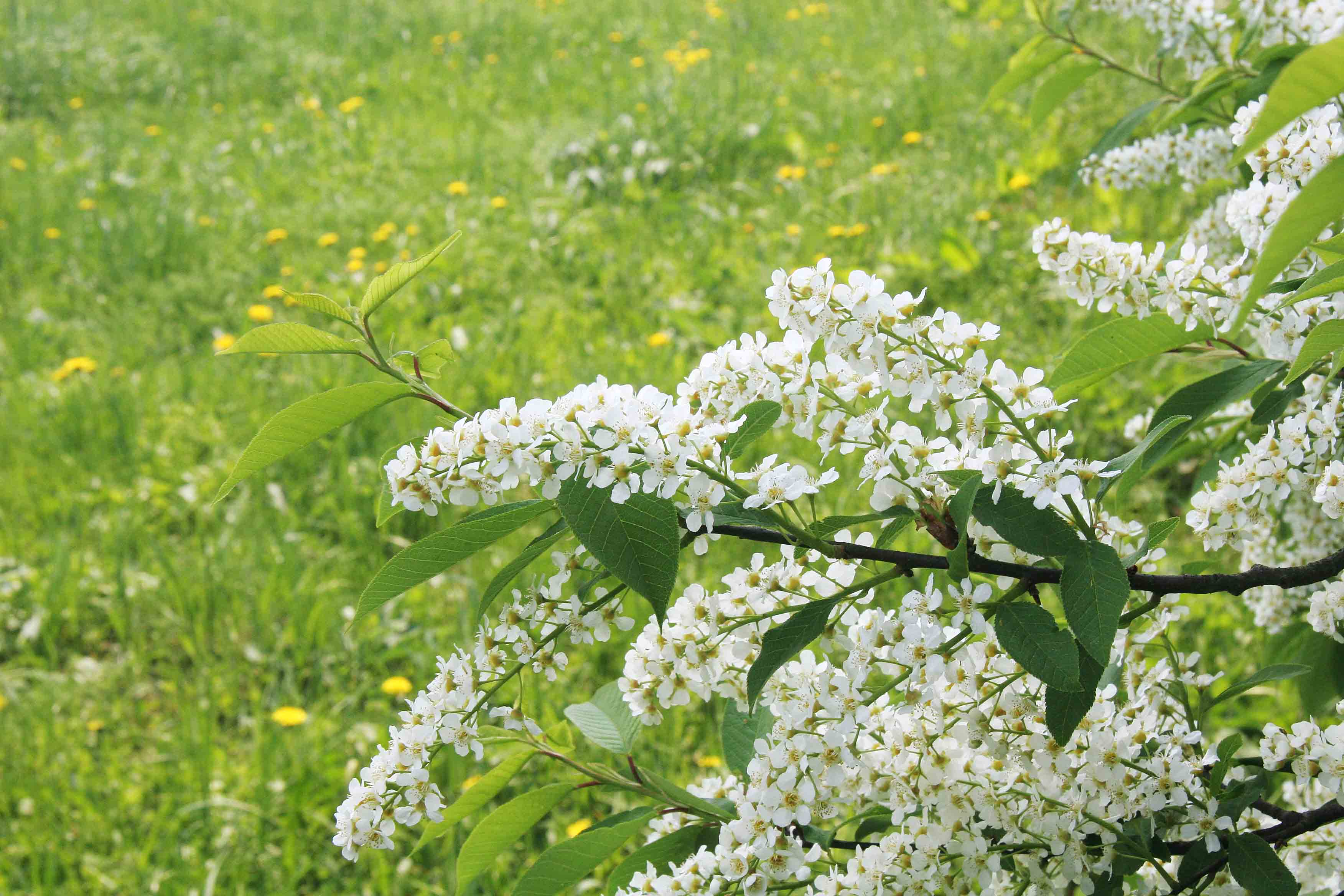 Prunus padus autor:Prazak